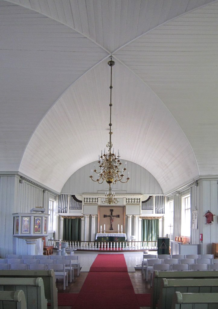 Interiør i Vinger kirke, Kongsvinger